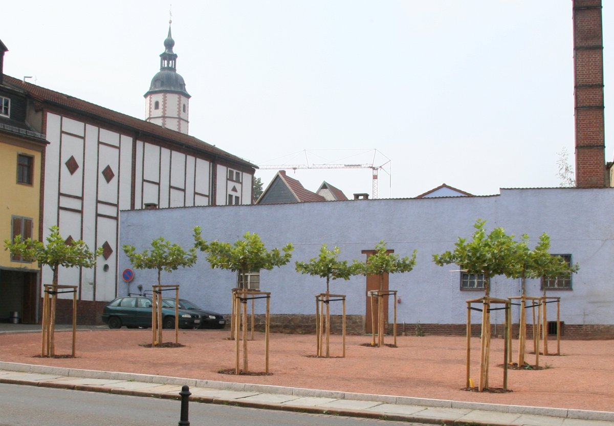 Dachplatanen am Markt in Penig